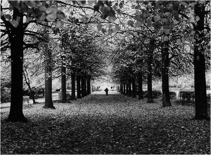 Die große Lindenallee im Schloss-Park